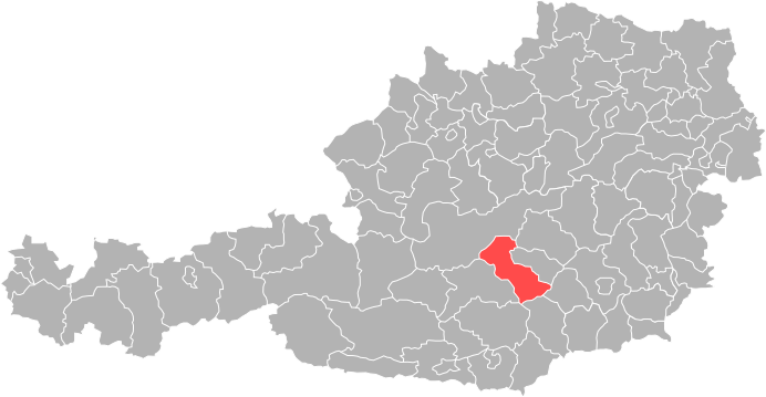 Bezirk Judenburg in Österreich